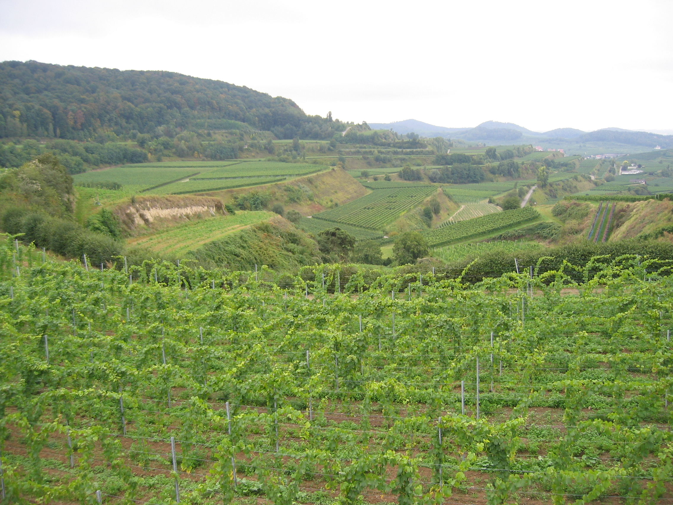 Großterrassen nach Flurbereinigung am Kaiserstuhl (bei Bischoffingen). Aufgenommen im Herbst 2004 von Benutzer:Jean.Schaumloeffel